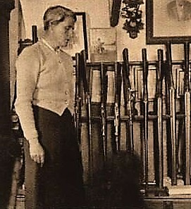 Lata Brandisová, zámeček Řitka 1938